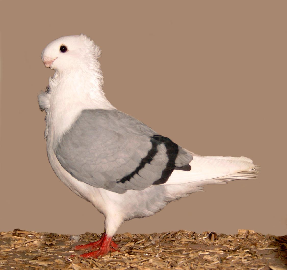 Turbit (Blue Bar)